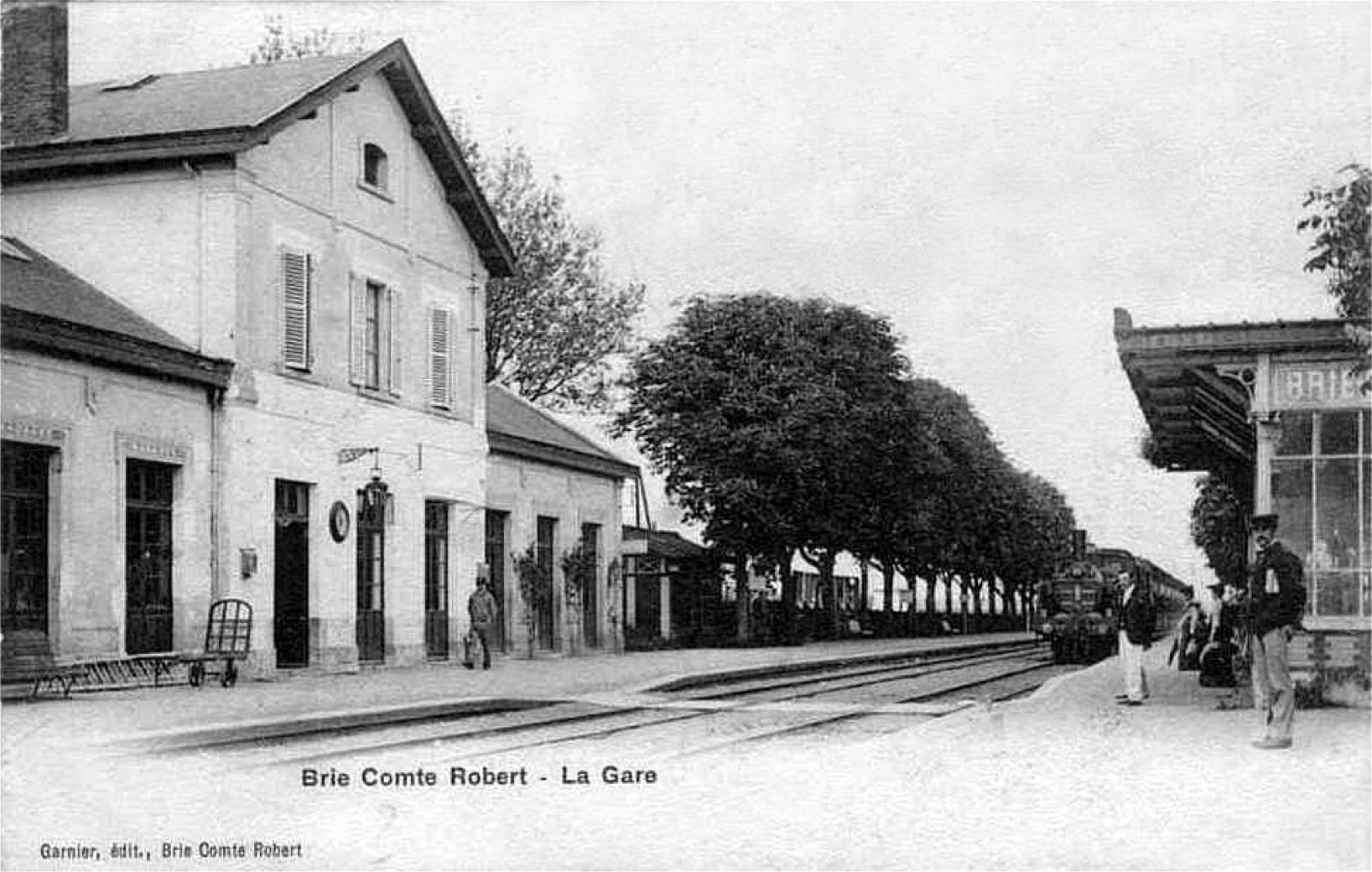 Intérieur de la gare de Brie-Comte-Robert, avec l'arrivée d'un train à vapeur.